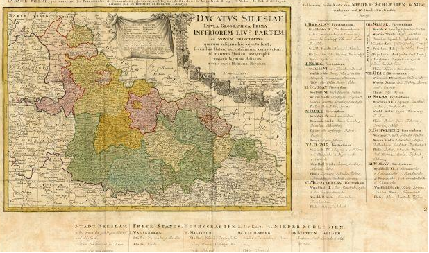 Mapa z Atlasu Silesiae